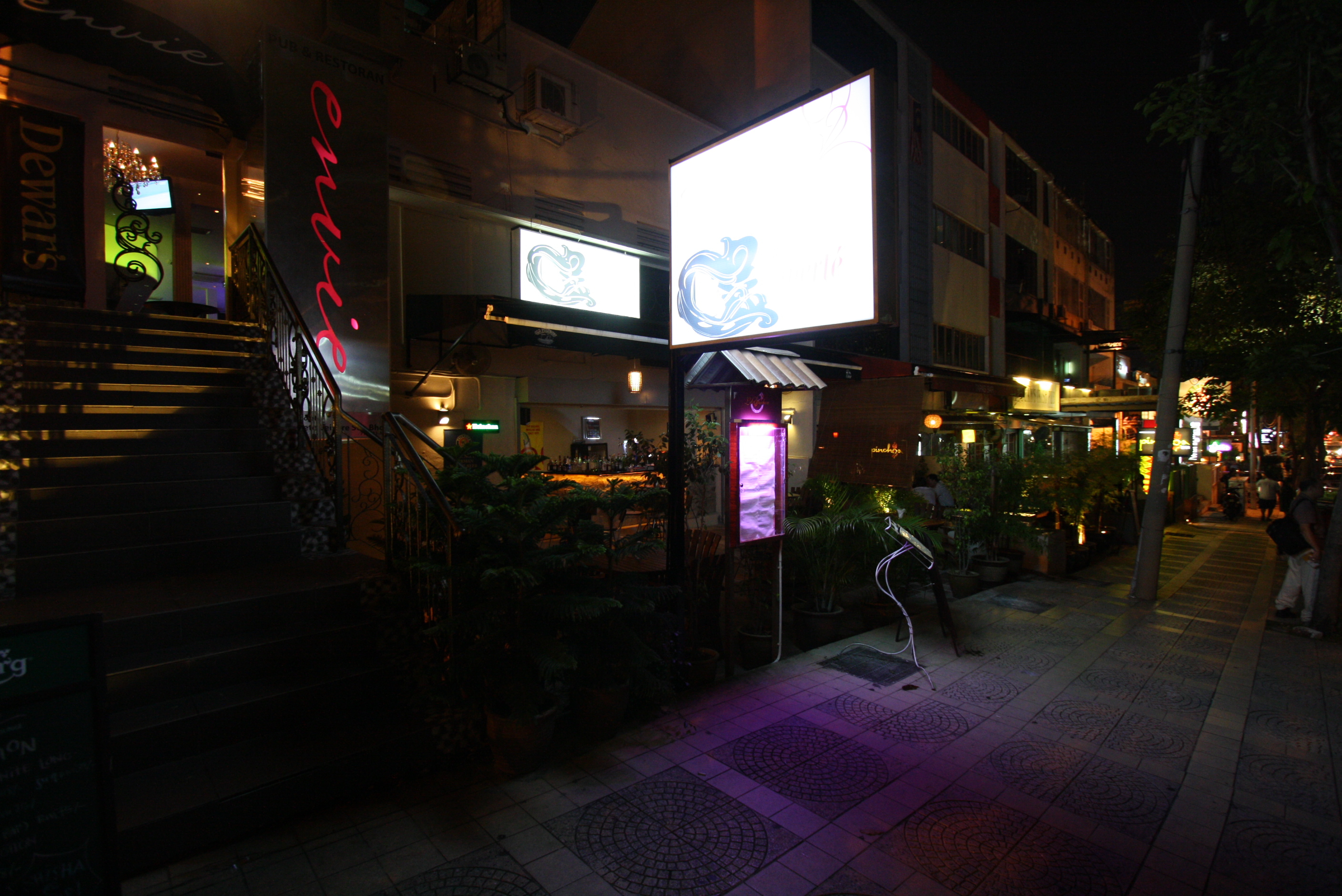 Night in Changkat Bukit Bintang